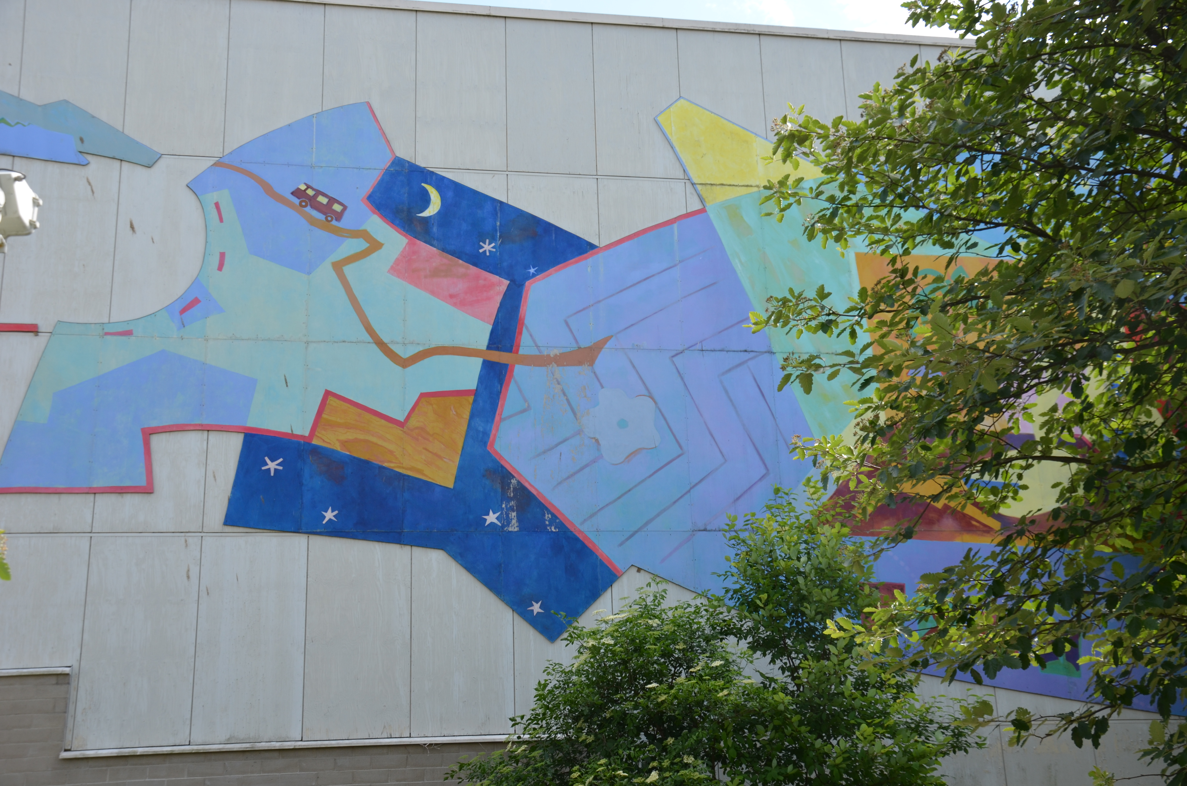 Detalj av Gittan´Jönssons målning Klänningsdramat och det brinnande hjärtats gångjärnsdans på fasaden till Riksteatern i Botkyrka, Sverige